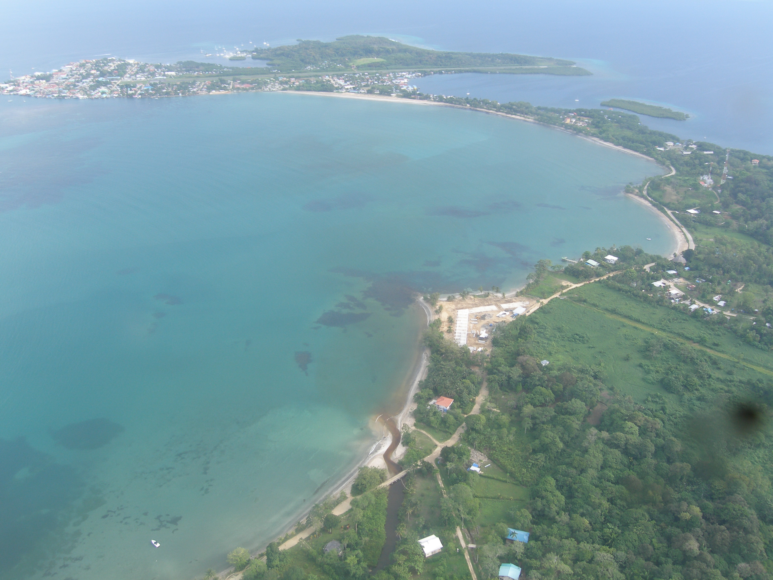 Vista aérea de la Isla Colón, Bocas del Toro